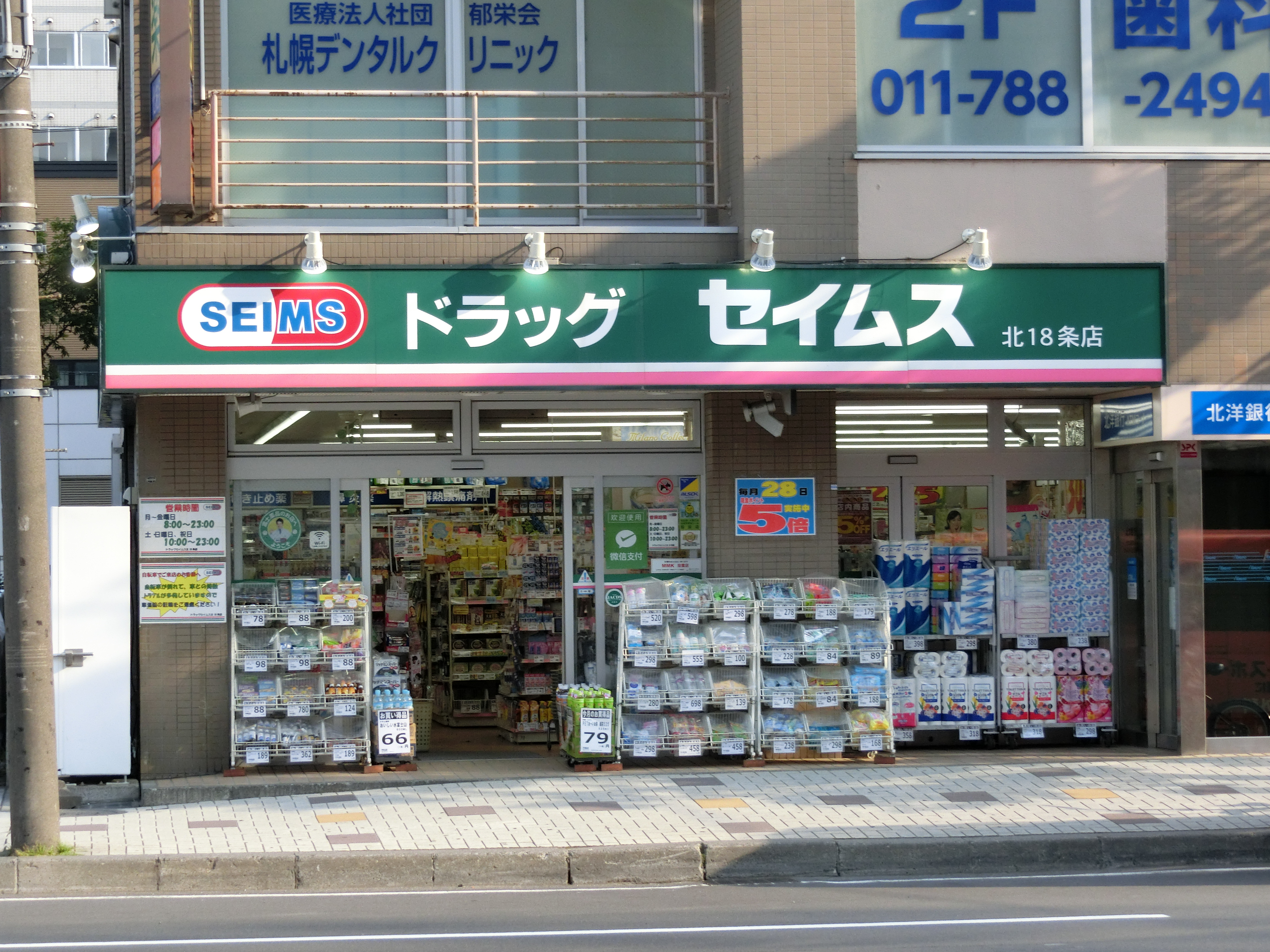 北海道札幌市北区北17条西4丁目の北18条駅前にある、オストジャパングループが運営するドラッグセイムス北18条店